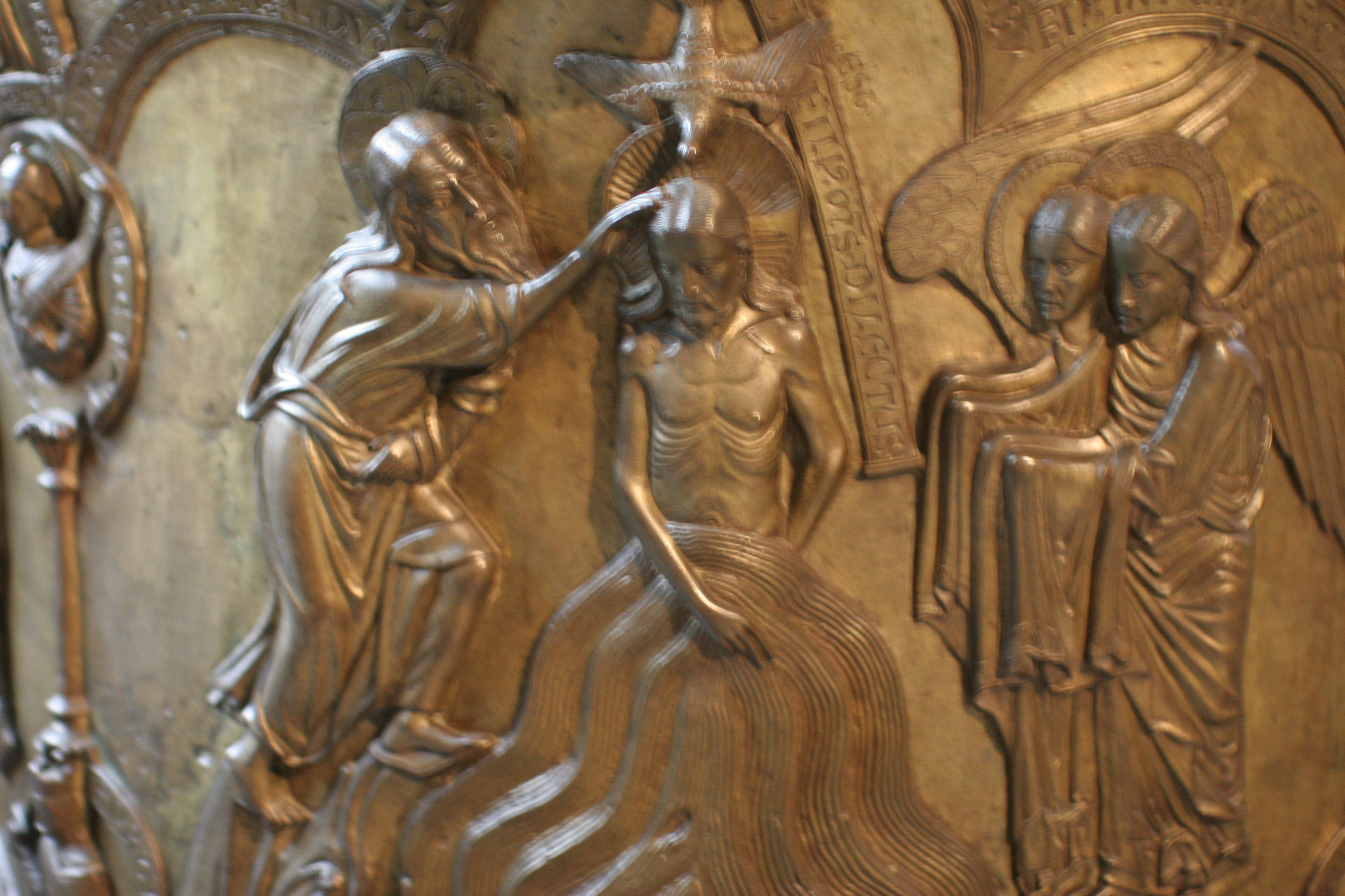 Taufbecken im Hildesheimer Dom Detail: Taufe Christi im Jordan